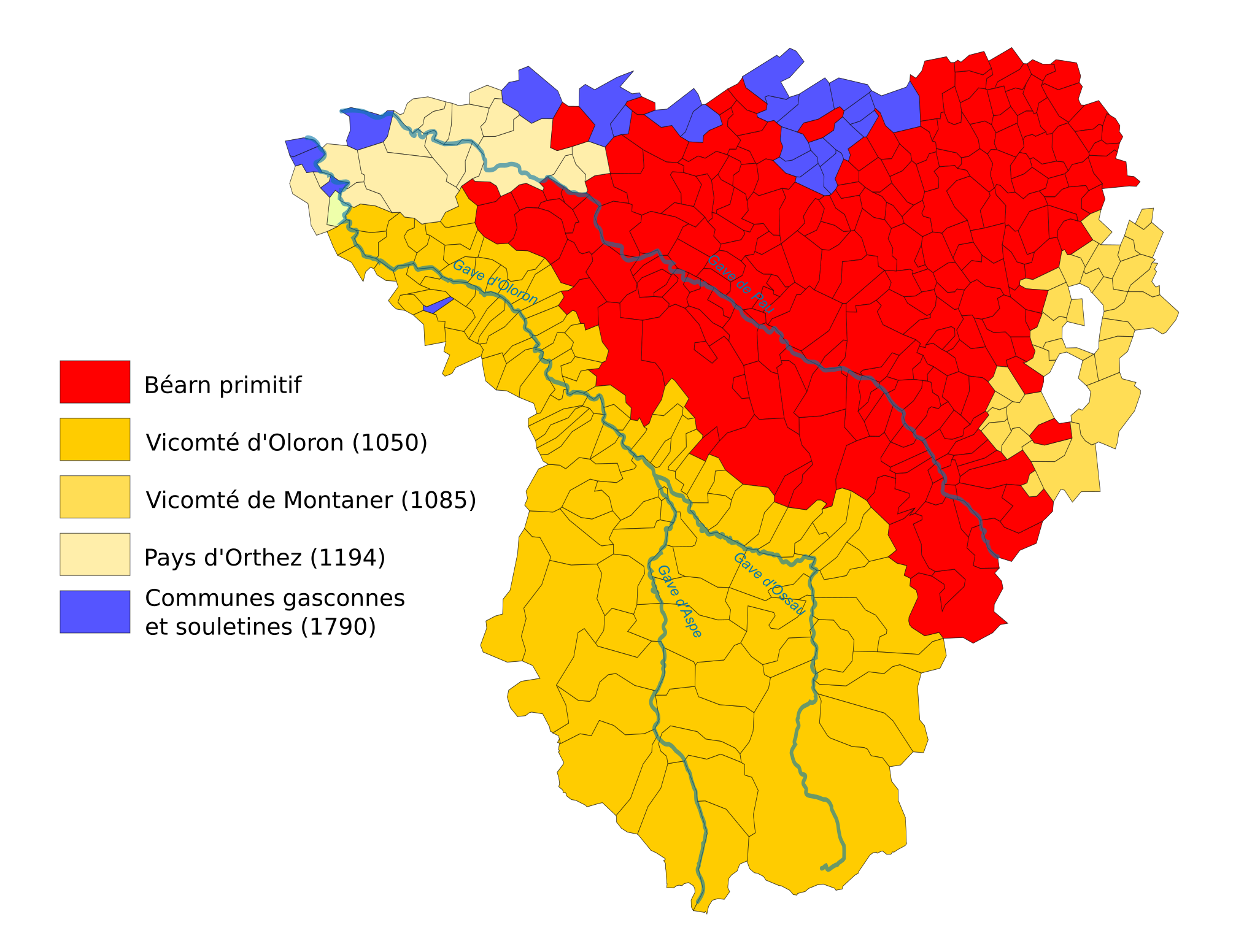 Les différentes étapes de la formation du Béarn